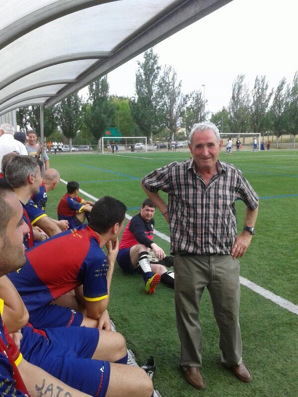 Joan Murtró, ànima de l'equip